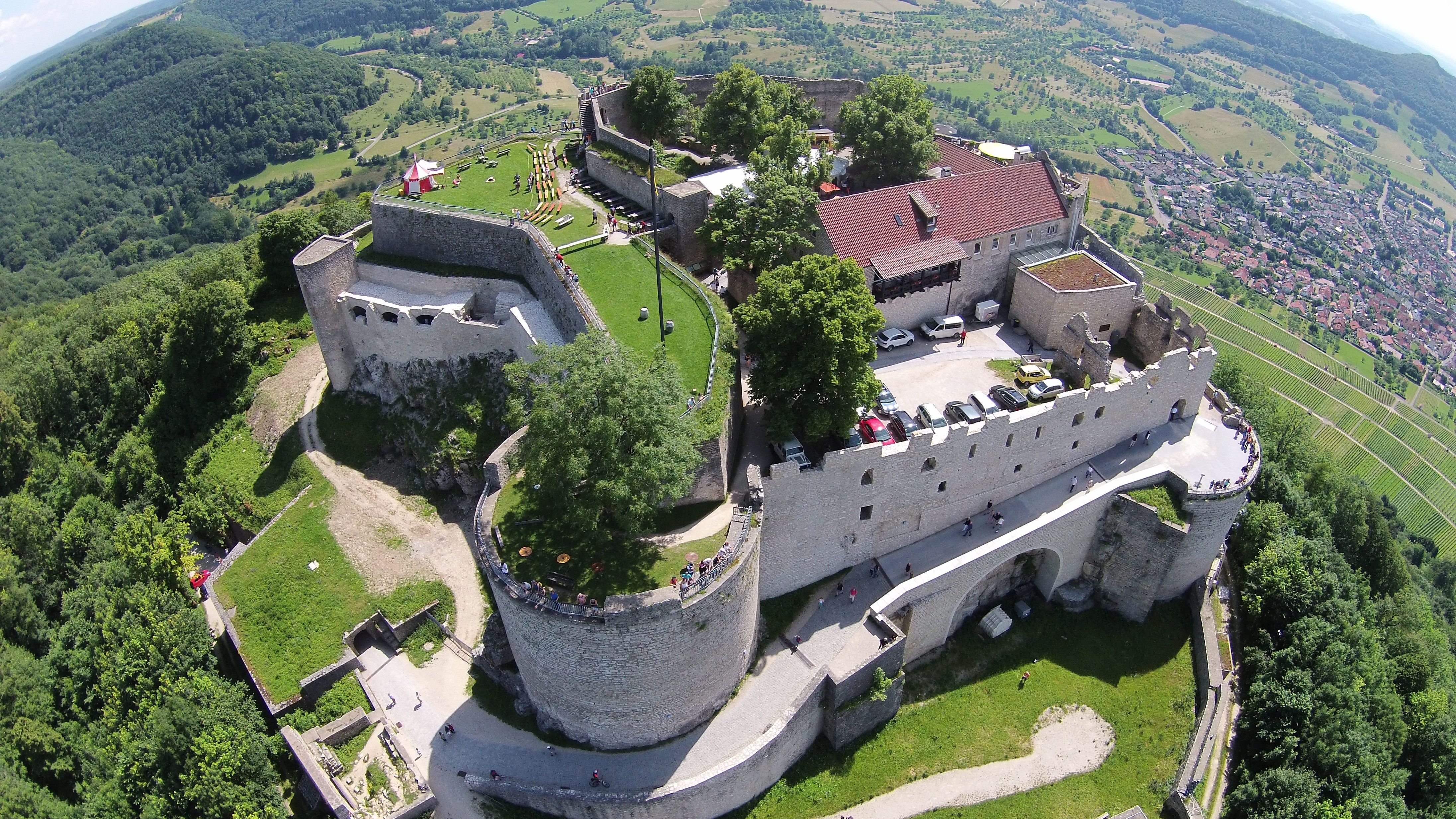 Burg Hohen Neuffen aus Nordost